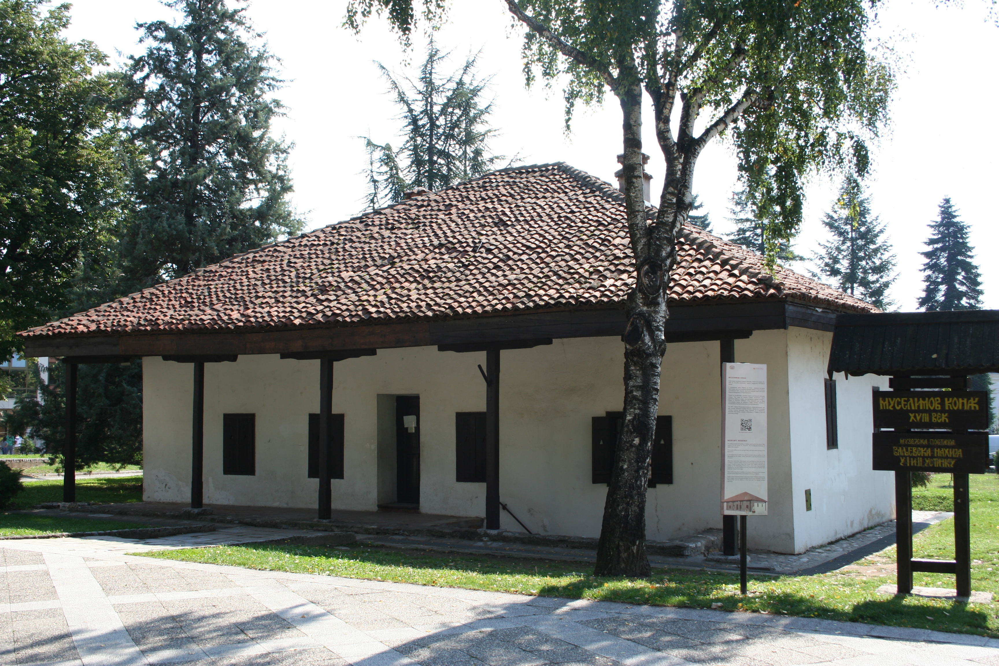 Muselimov konak Valjevo